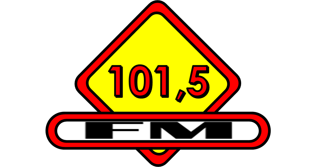 Logo da Rádio 101Fm de Volta Redonda (RJ)